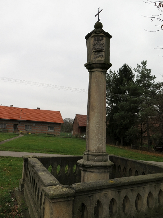 Boží muka s trojičním motivem, náves, Liběšice (Češov).